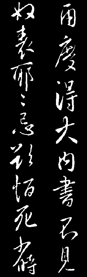 唐太宗李世民手迹